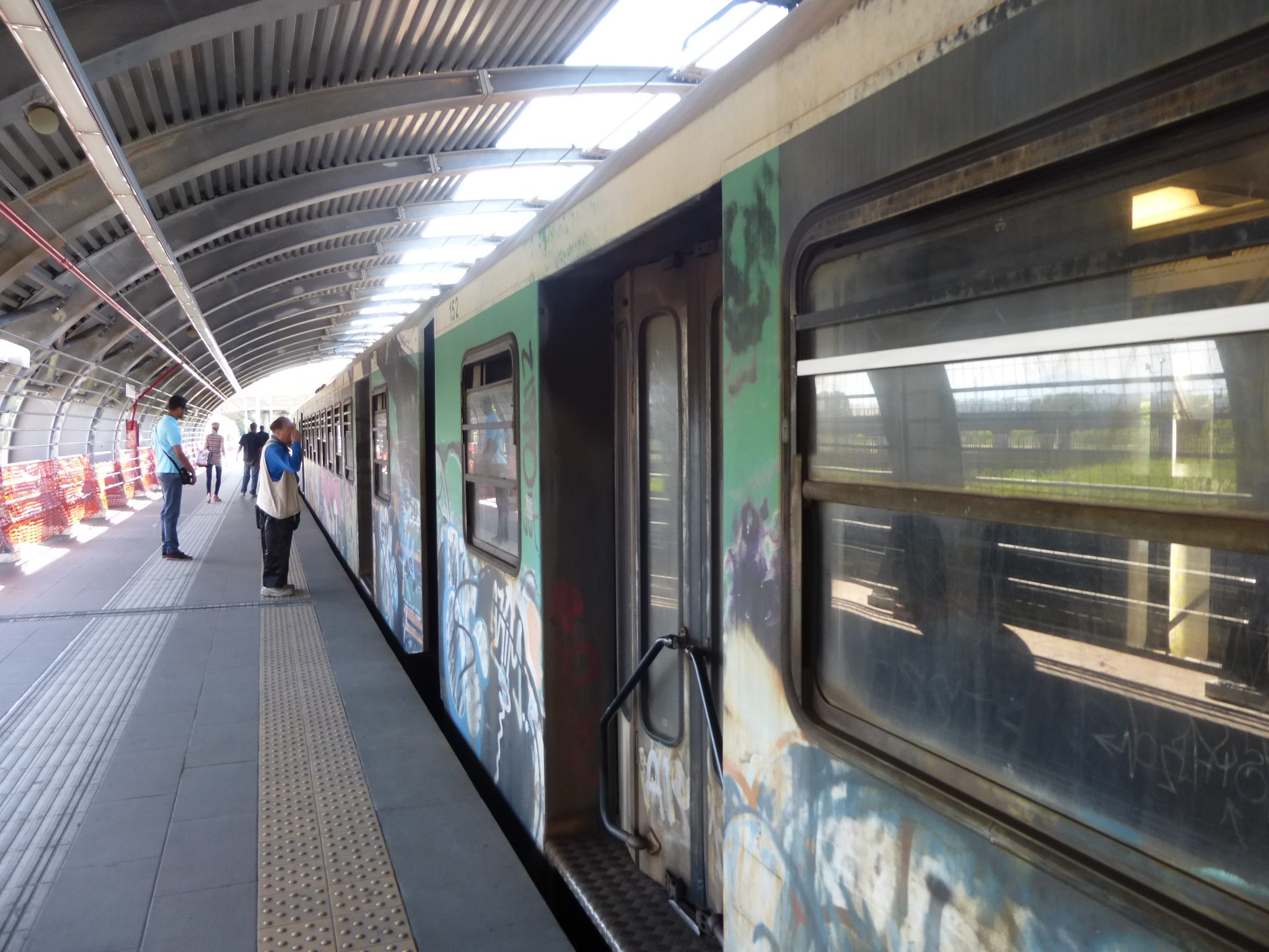 Roma, Prima Porta. Vecchio materiale rotabile in servizio sulla Roma-Viterbo.